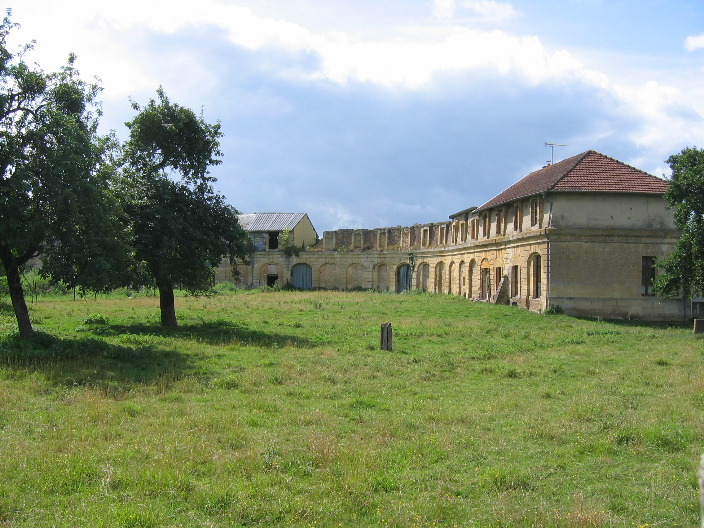 Ecuries de l'ancien château Augeard Buzancy Ardennes France